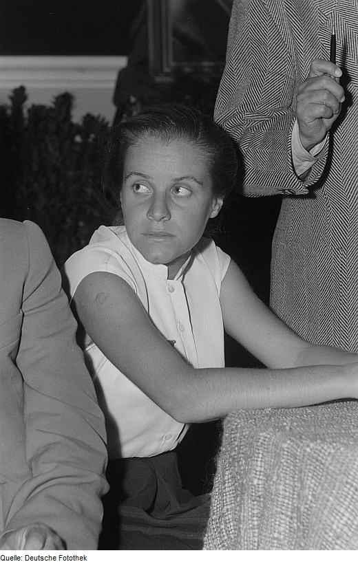 Original image description from the Deutsche Fotothek Milka Tuykowa bei der Premiere der deutschen Fassung des bulgarischen Films "Unter dem Joch" (1952) im Georgi-Dimitroff-Museum